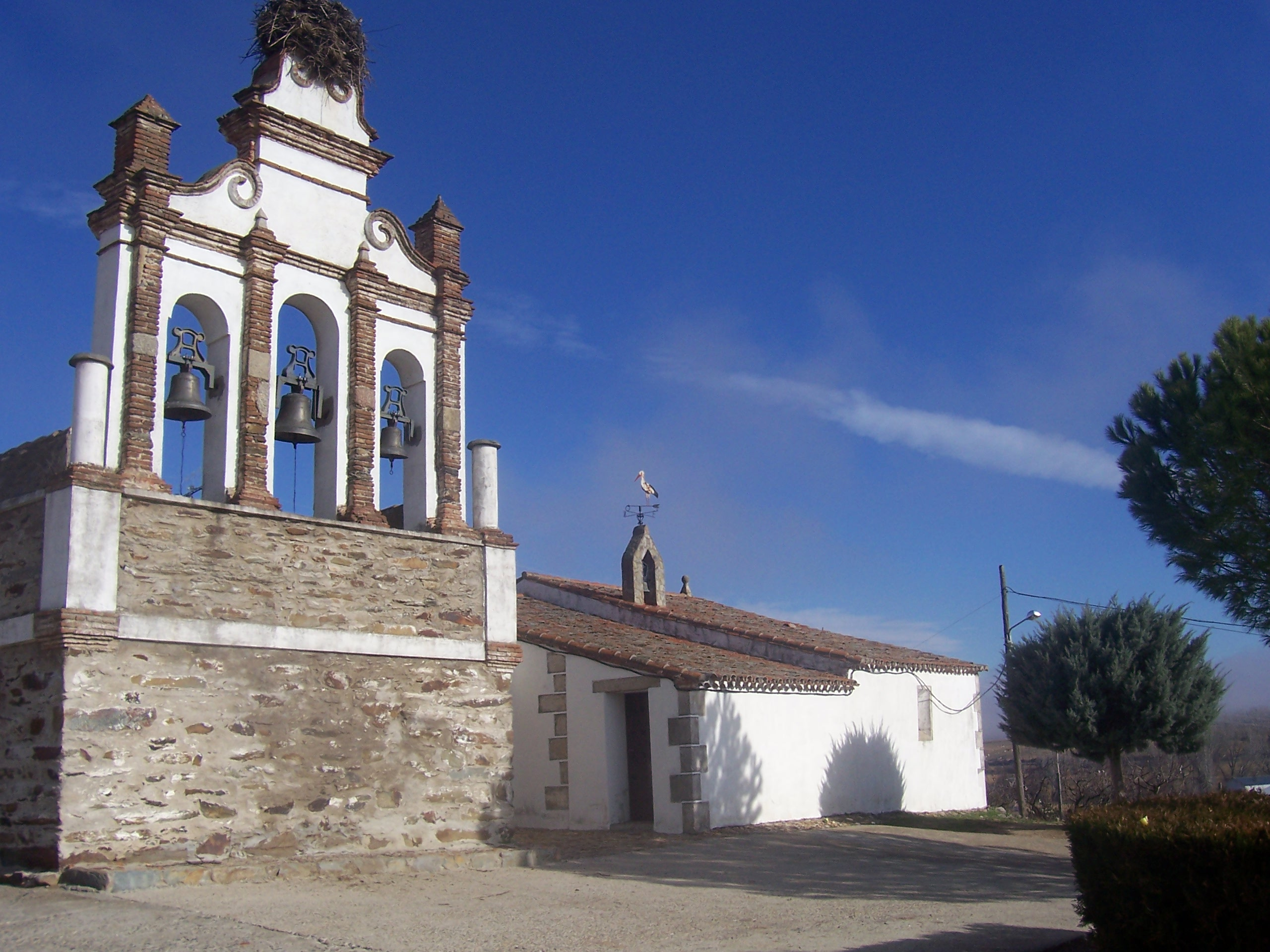 Iglesia de San Andrés, Morcillo, provincia de Cáceres, España.